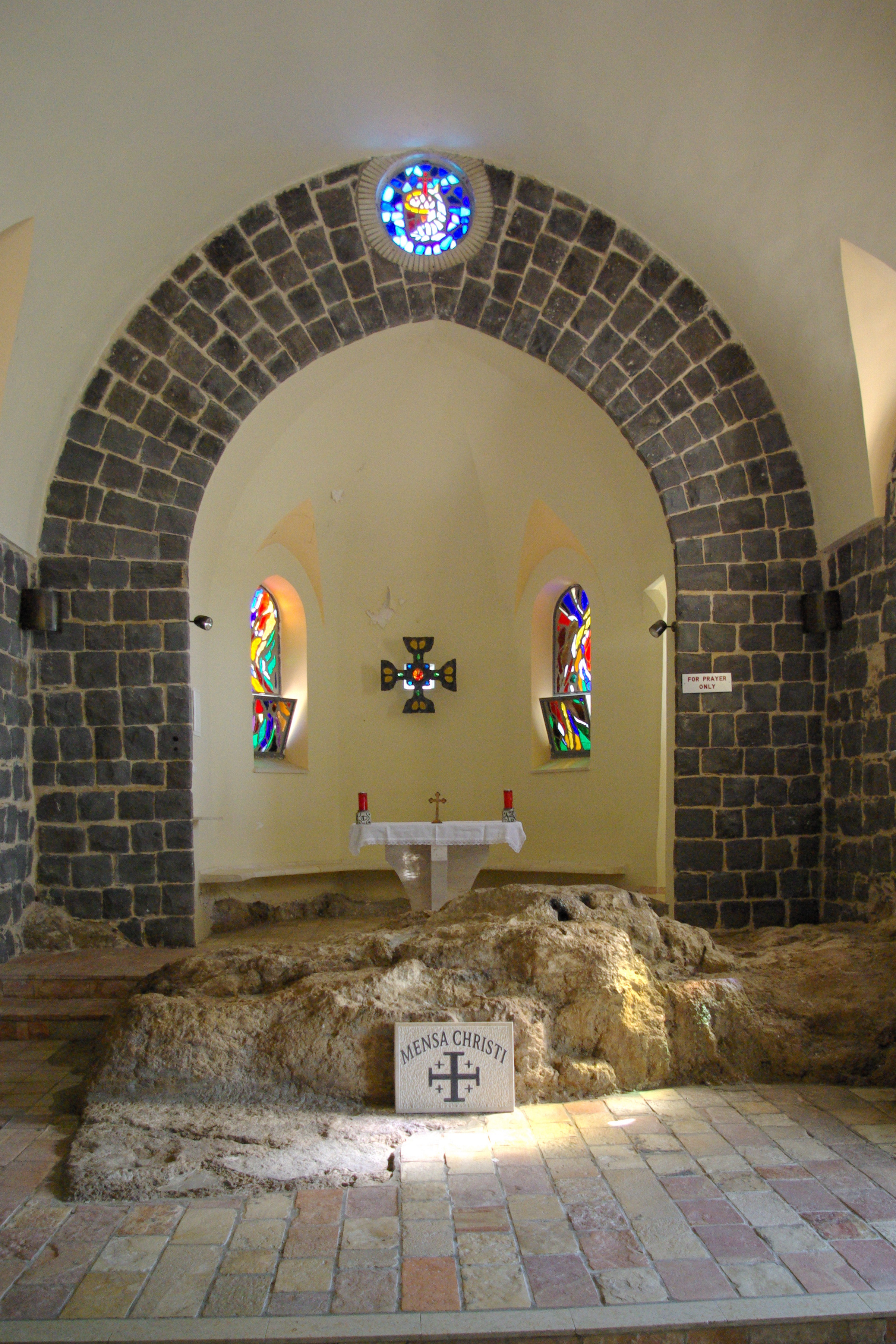 Primatskapelle